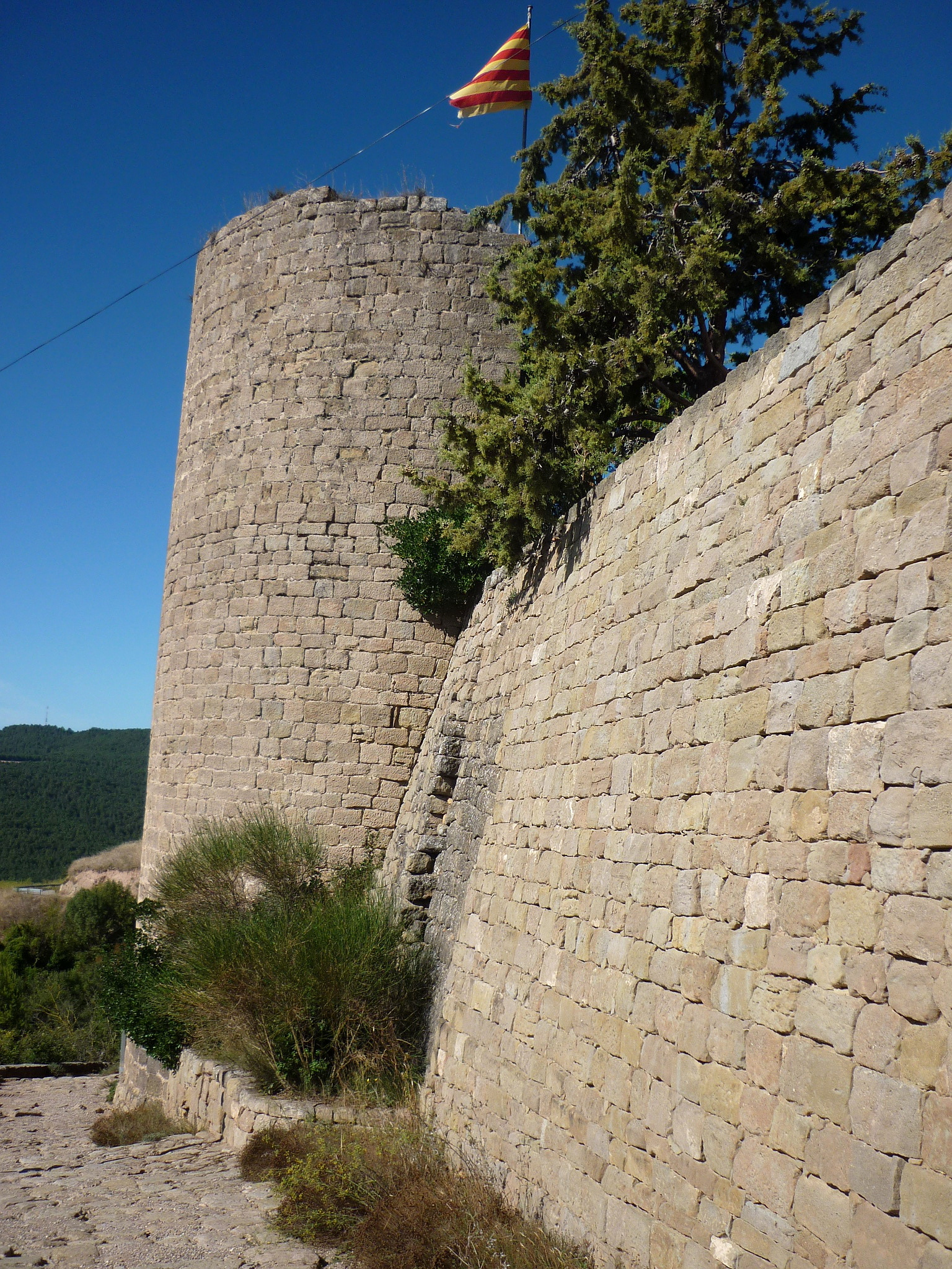 Castellvell de Solsona (Olius)